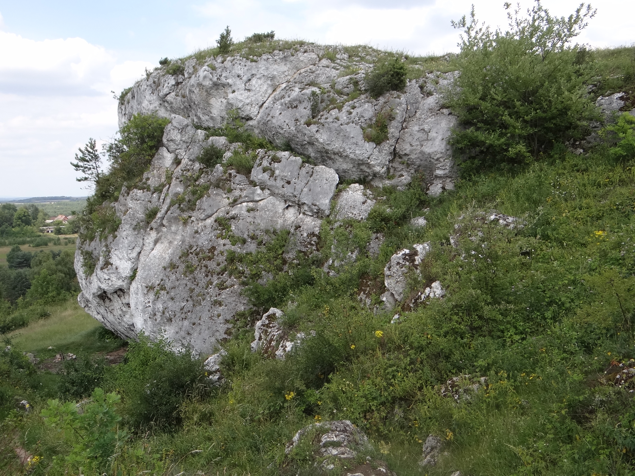 Góry Towarne Duże